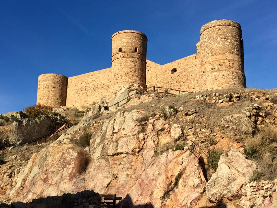 Vista general del Castillo de Capilla-Badajoz